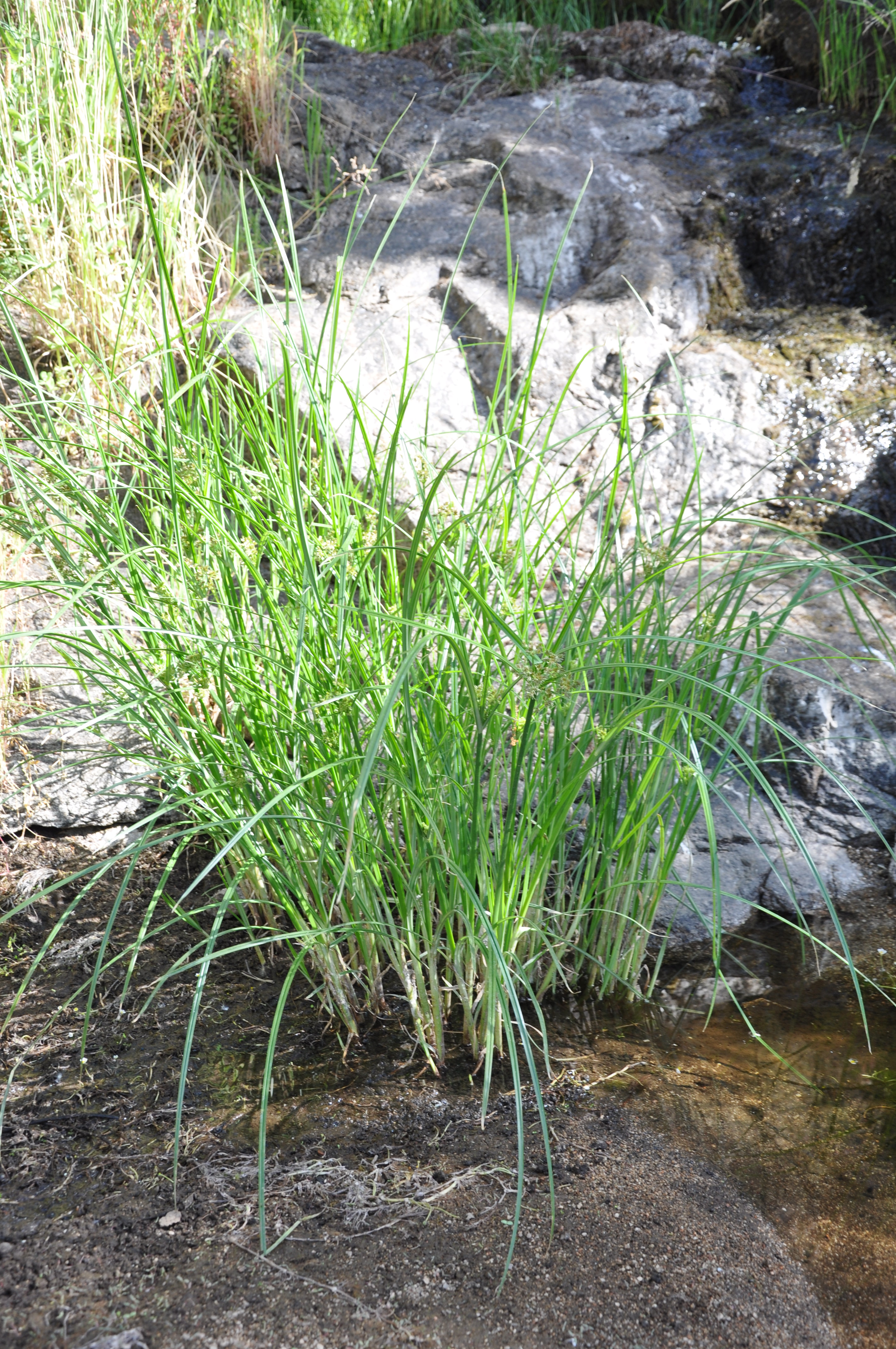 Habitus de Cyperus longus en Guareña-La Torre (Ávila) .España.